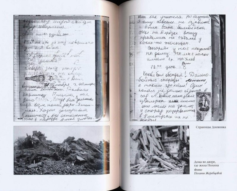 Скан из книги дневник Жеребцовой Полины.